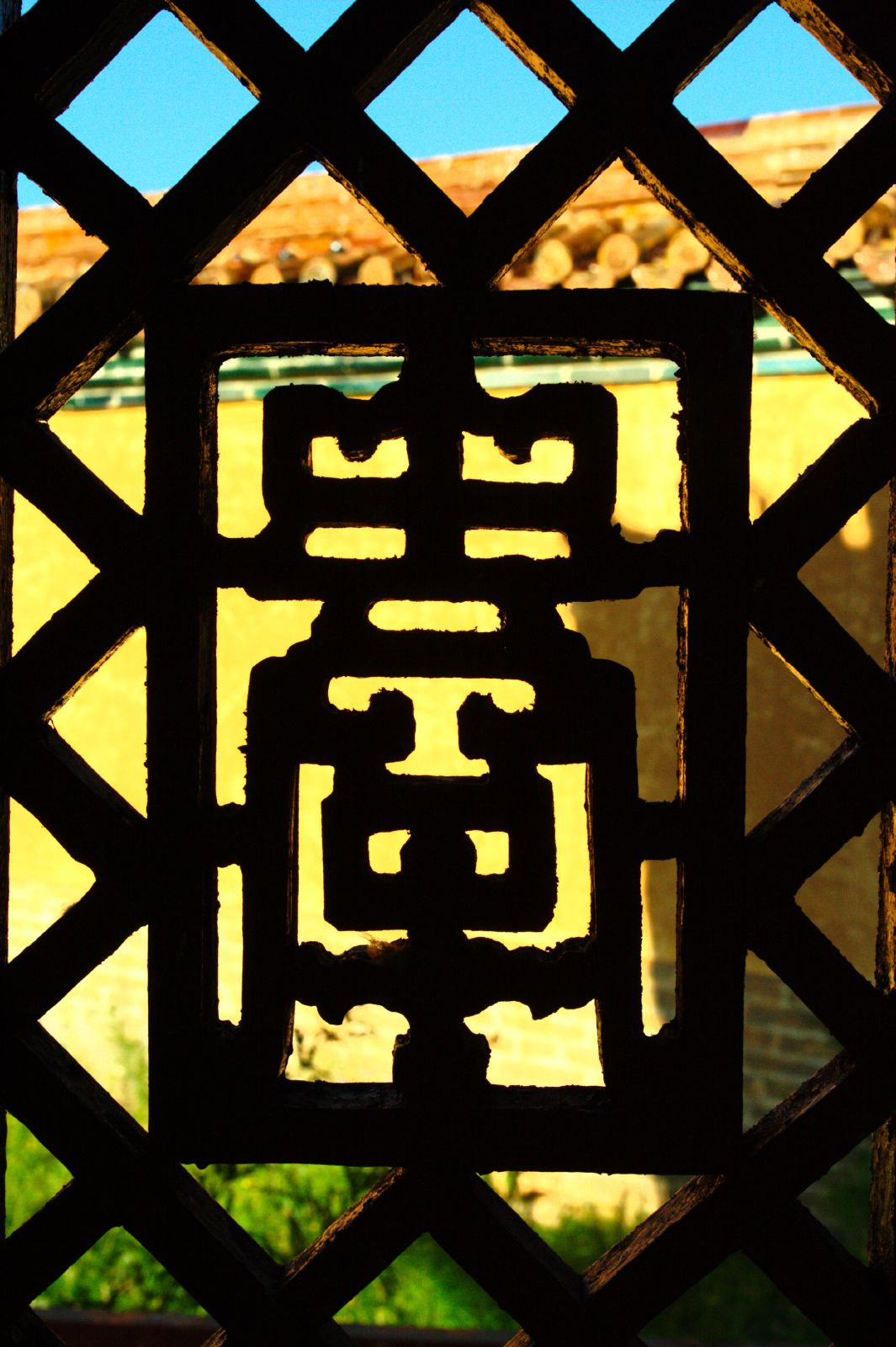 Amarbayasgalant Khiid